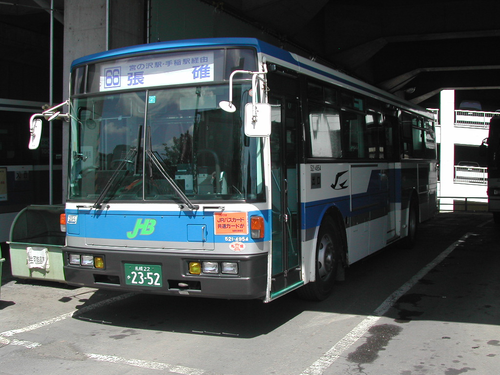 66 張碓行き 札幌営業所にて、許可を得て撮影